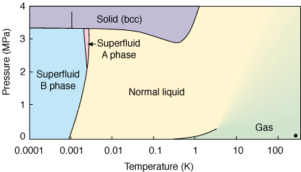 Phasendiagramm 3He